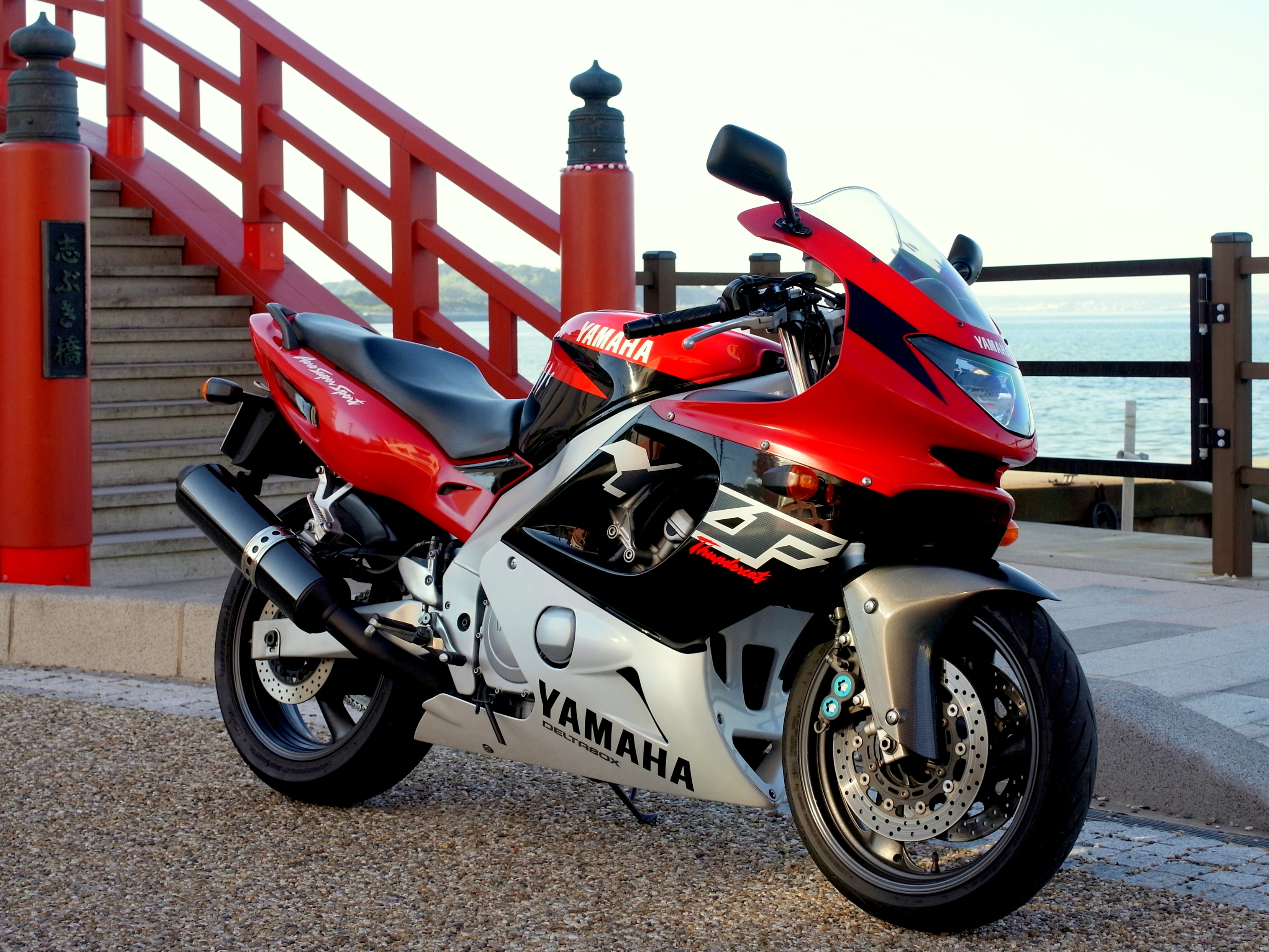 Own work